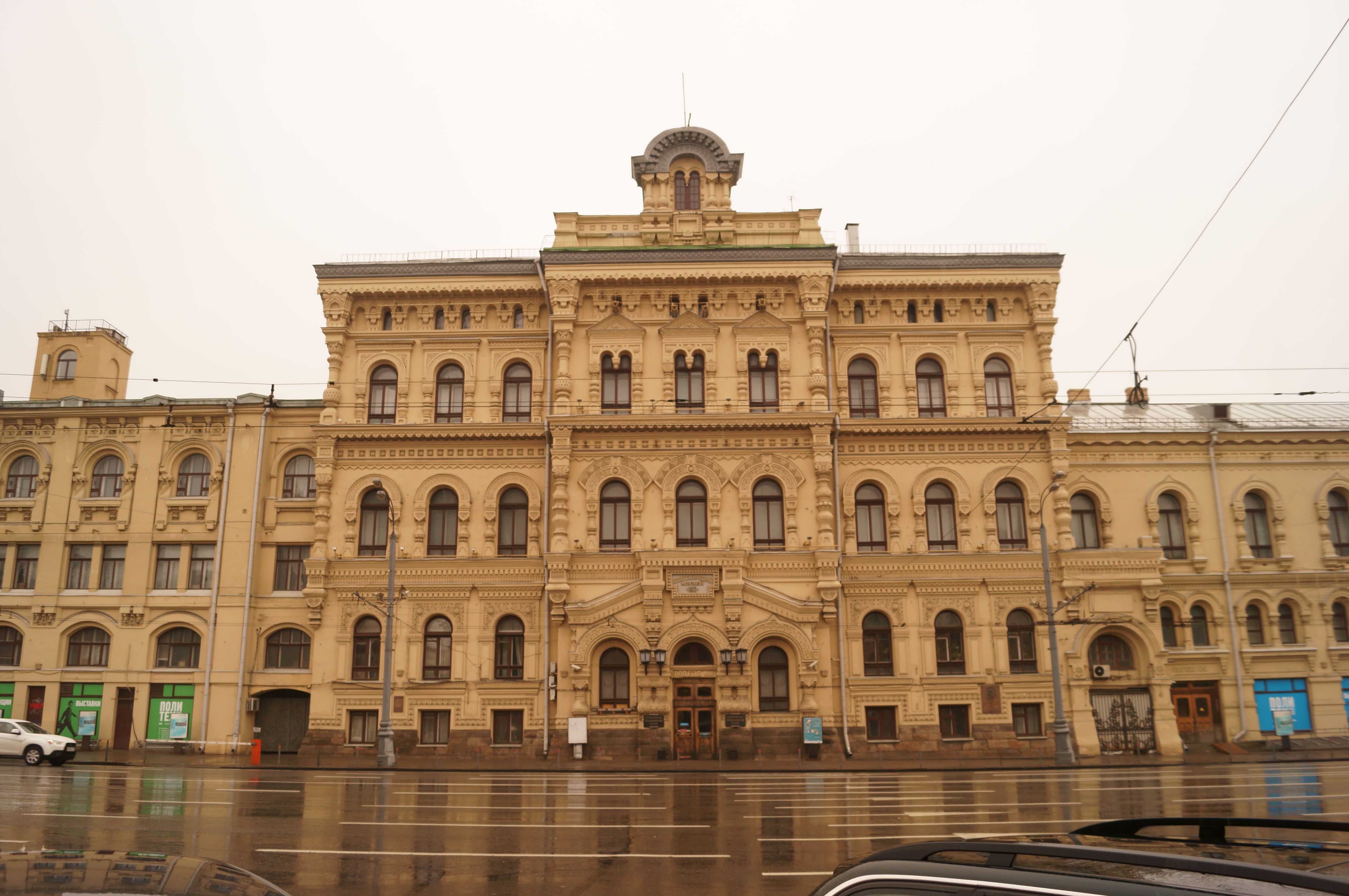 Музей Политехнический (Москва и Московская область, Москва, Новая площадь, 3-5, Политехнический пр., 2, Лубянский пр., 4-6)